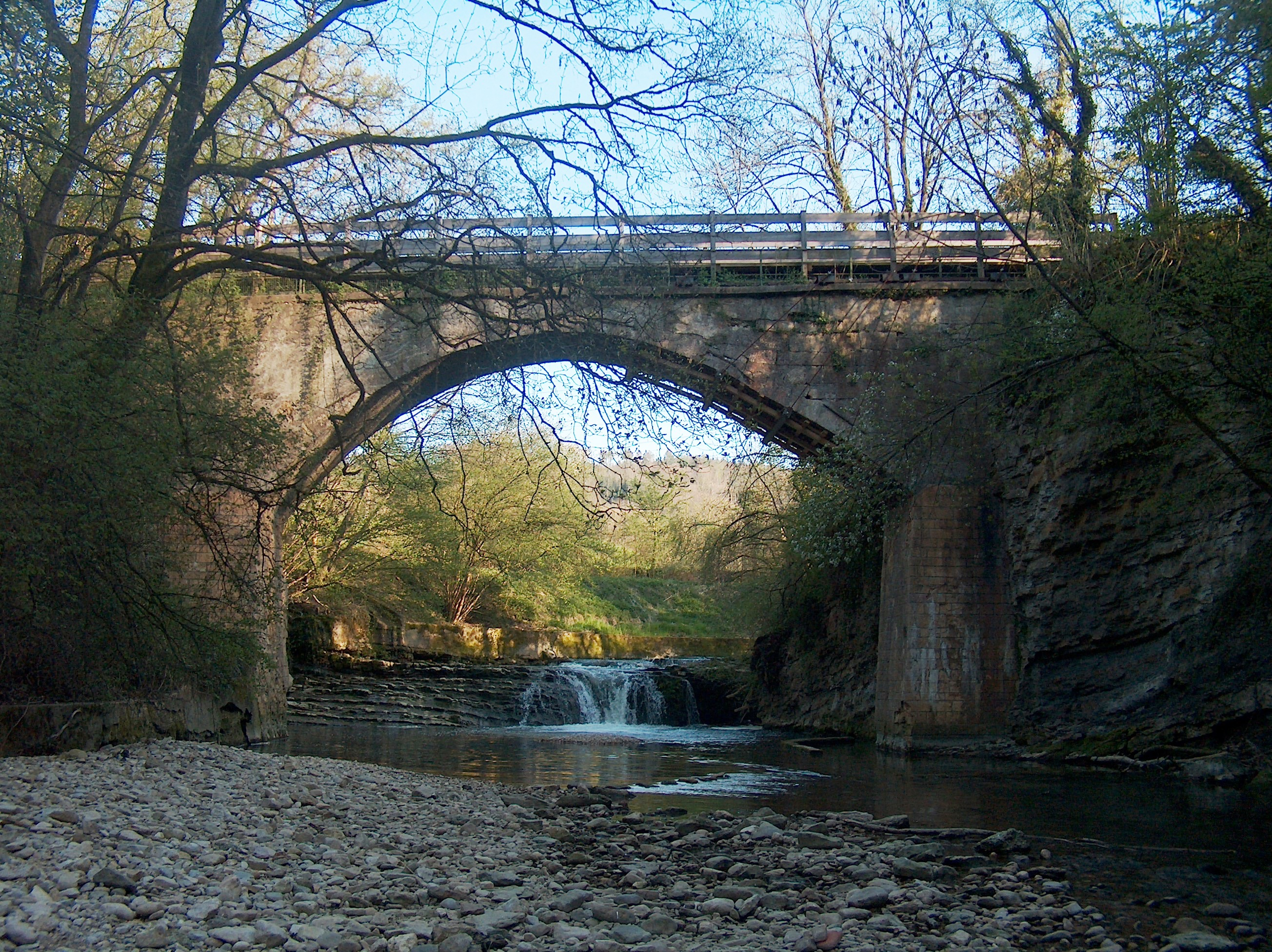 Steinenbrüggli over River Frenke in Liestal, possibly roman